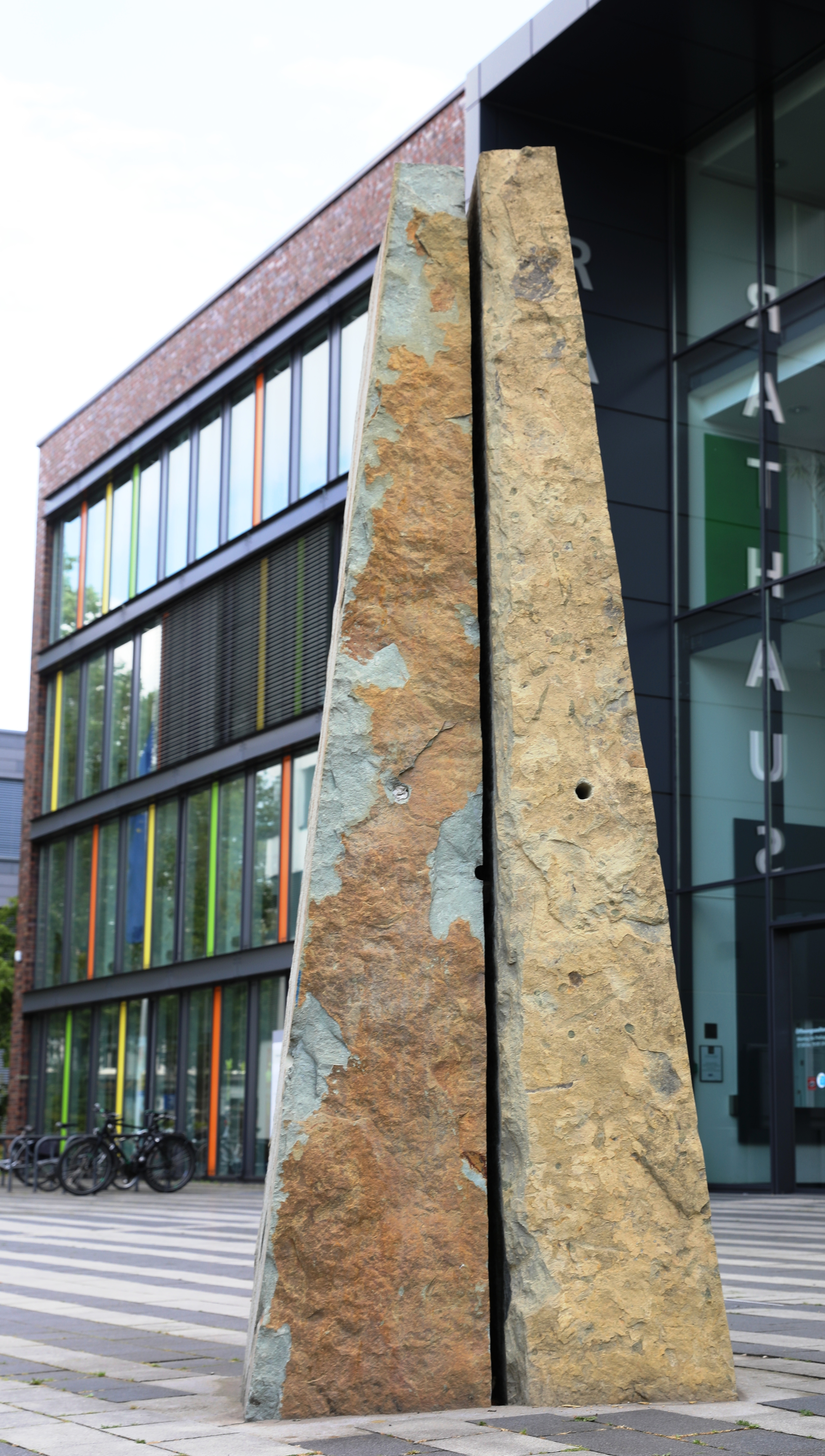 Stele aus Anröchter Dolomitgestein vor dem Rathaus Solingen. Künstler: Ulrich Rückriem. Gestiftet vom Solinger Kunstverein. Aufgestellt 2013